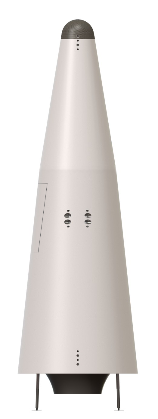 Одноступенчатая многоразовая РН КОРОНА на стоянке - общий вид